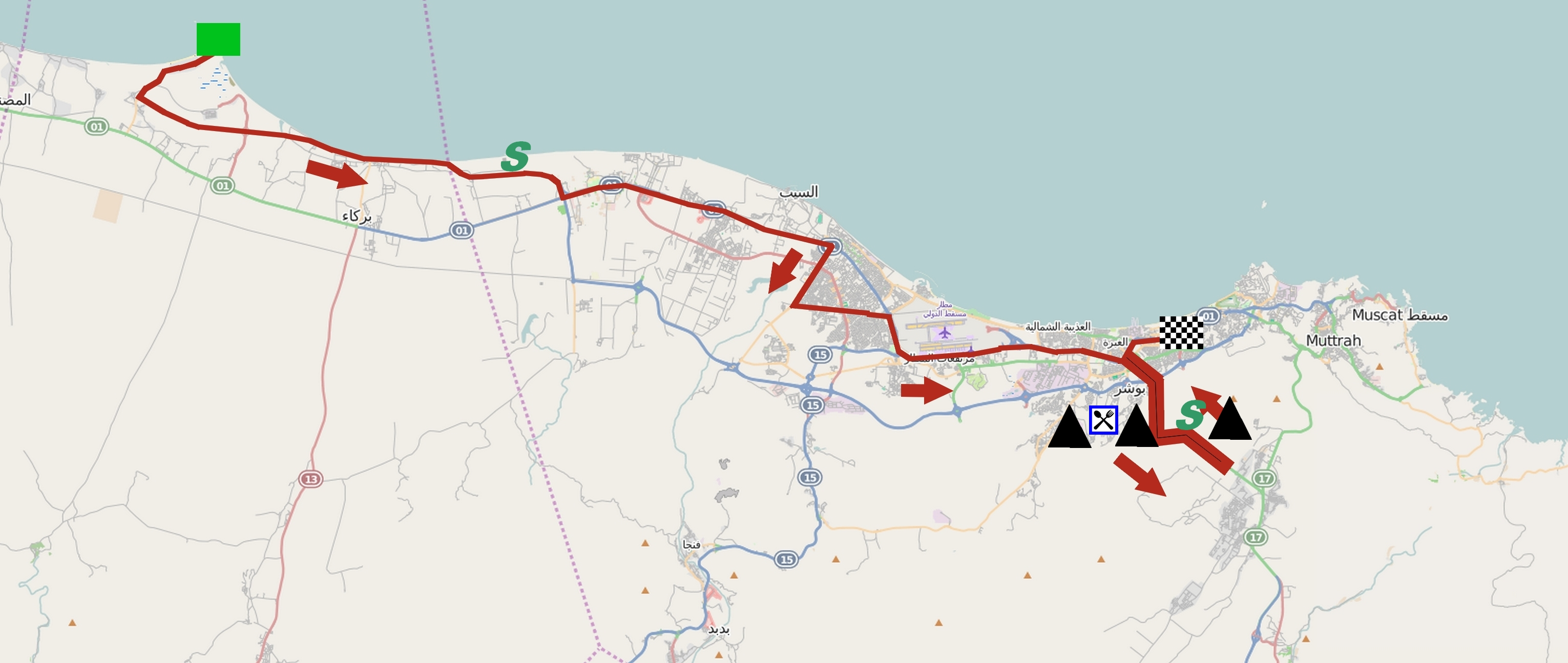 Parcours de la cinquième étape du Tour d'Oman 2015. This map may be incomplete, and may contain errors. Don't rely solely on it for navigation.